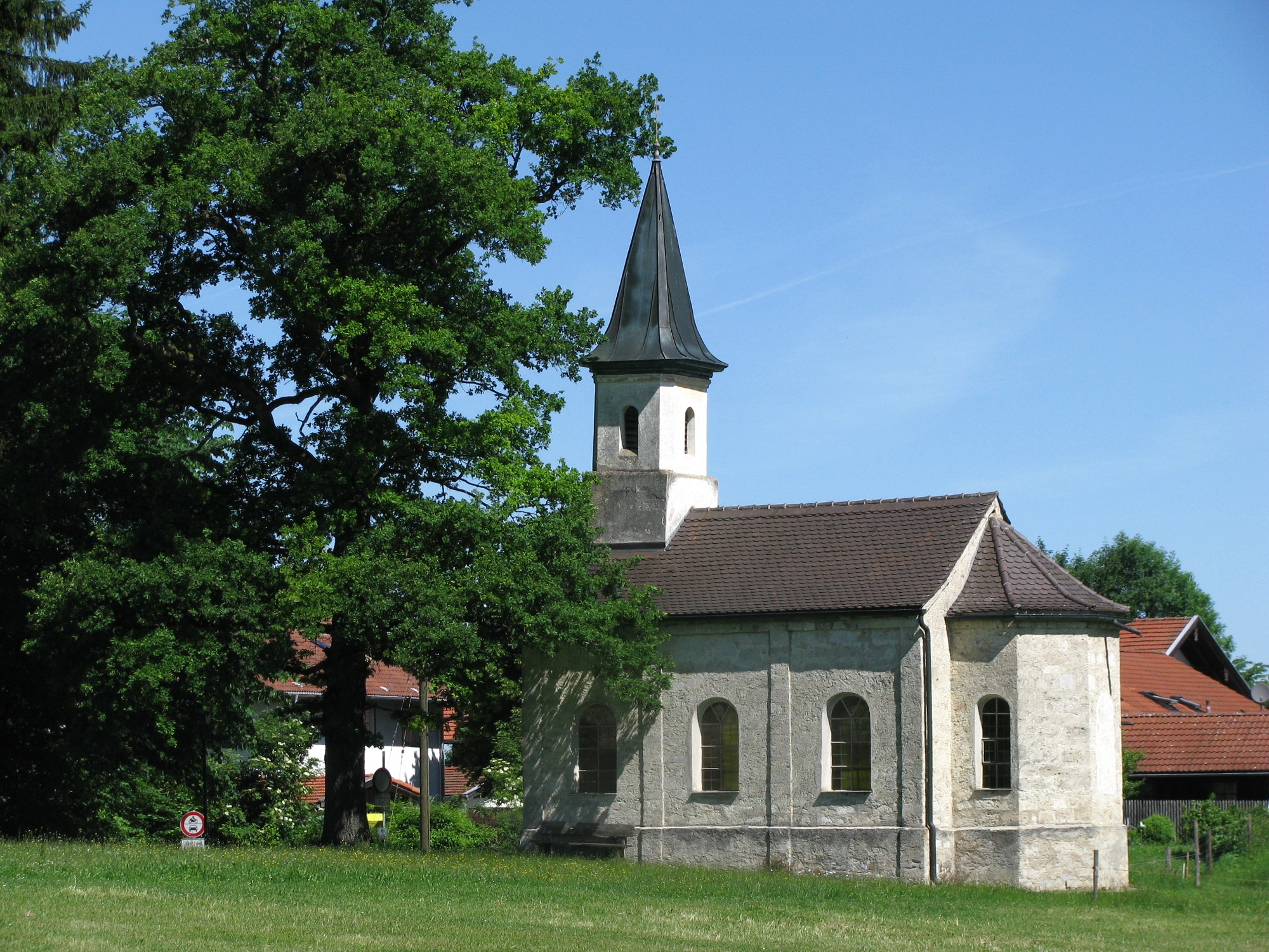 Kath. Kapelle St. Georg in Hornstein, Gemeinde Egling; nachklassizistisch, erbaut 1869; Südansicht